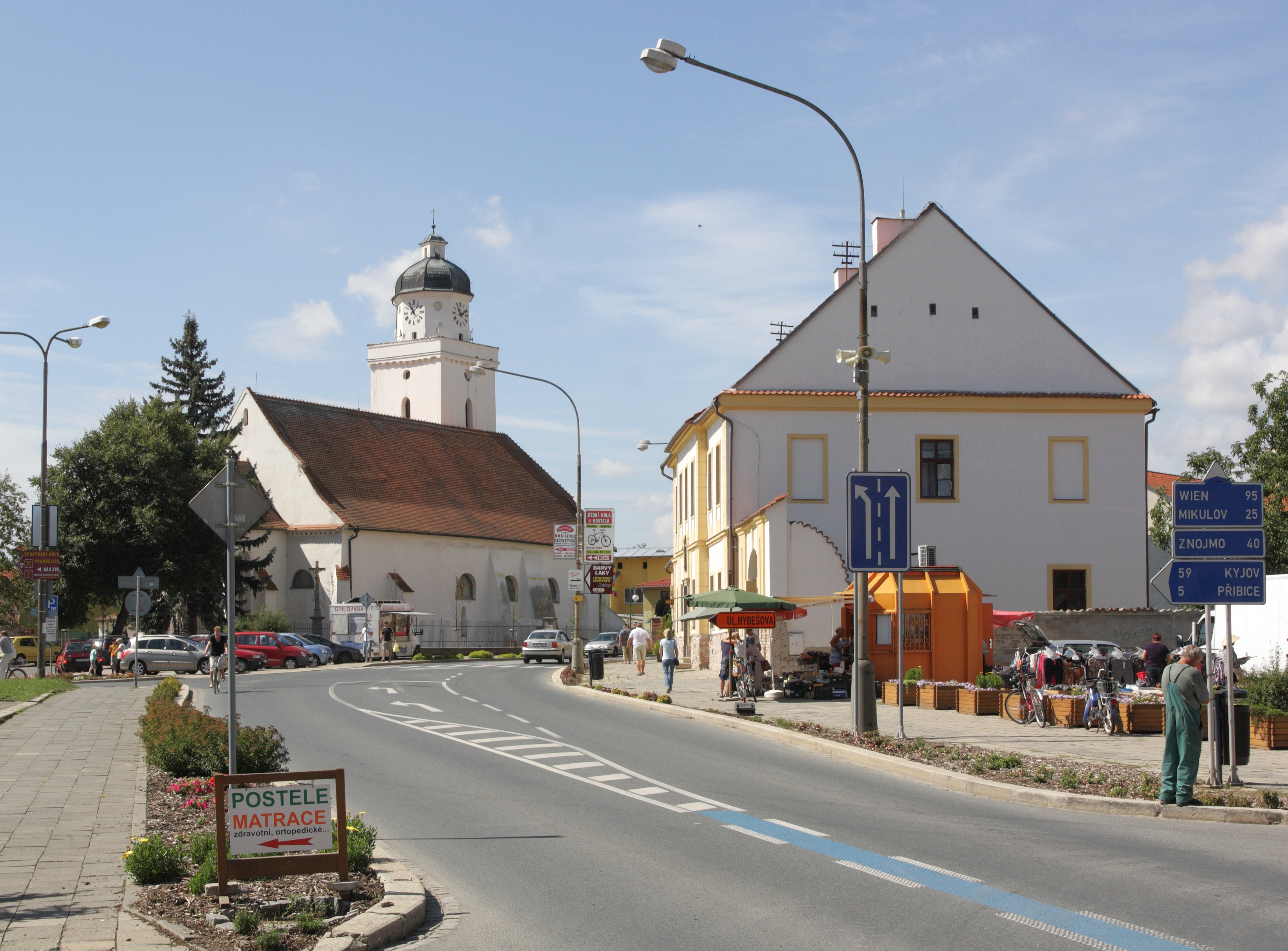 Pohořelice - náměstí Svobody.